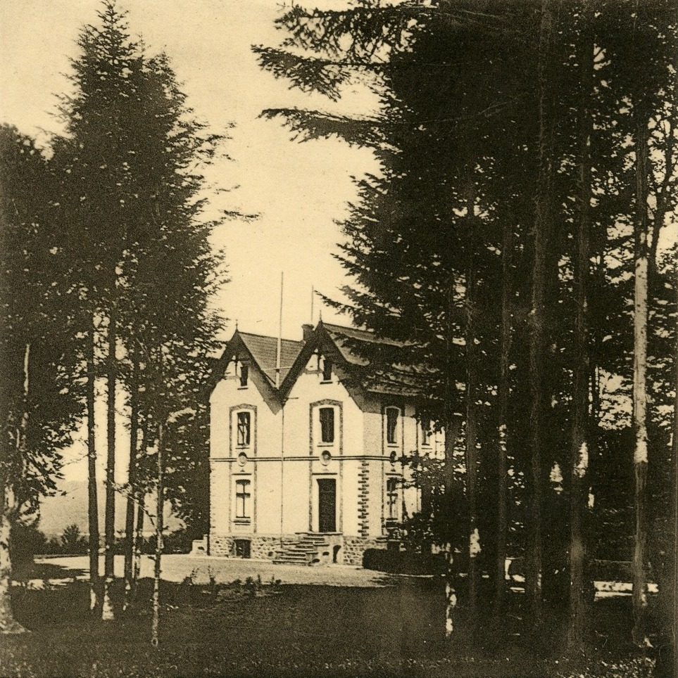 Addithus; Haus This postcard is from publisher Brück & Sohn in Meißen ( postcard has a unique number 24557 and is available in a higher resolution at the publisher. This images was uploaded in a cooperation project between Wikipedians and the publisher.